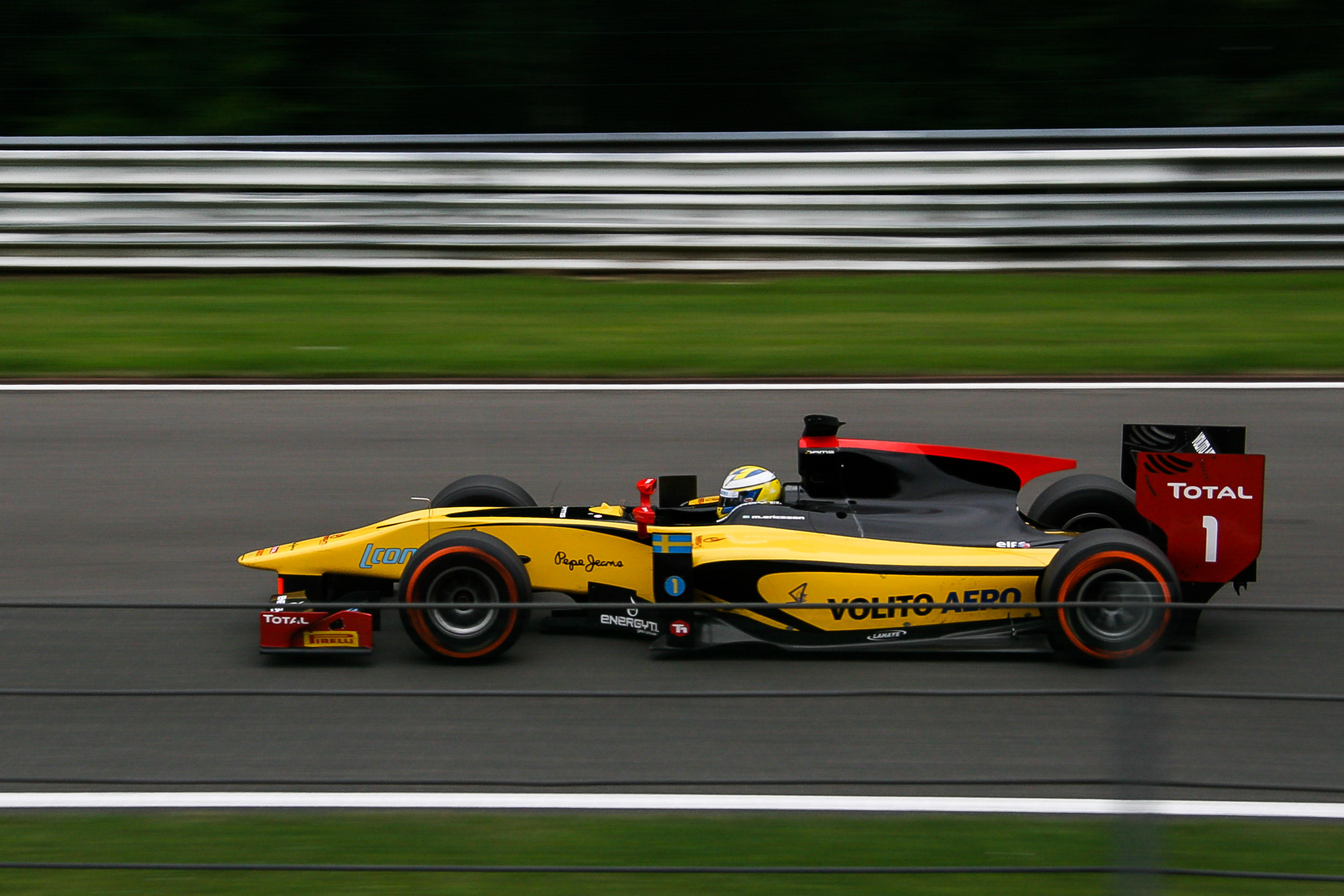 Marcus Ericsson beim Hauptrennen im Belgien 2013